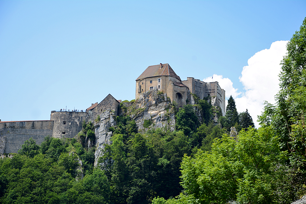 Châteu de Joux, Cluse-et-Mijoux, Franche-Comté